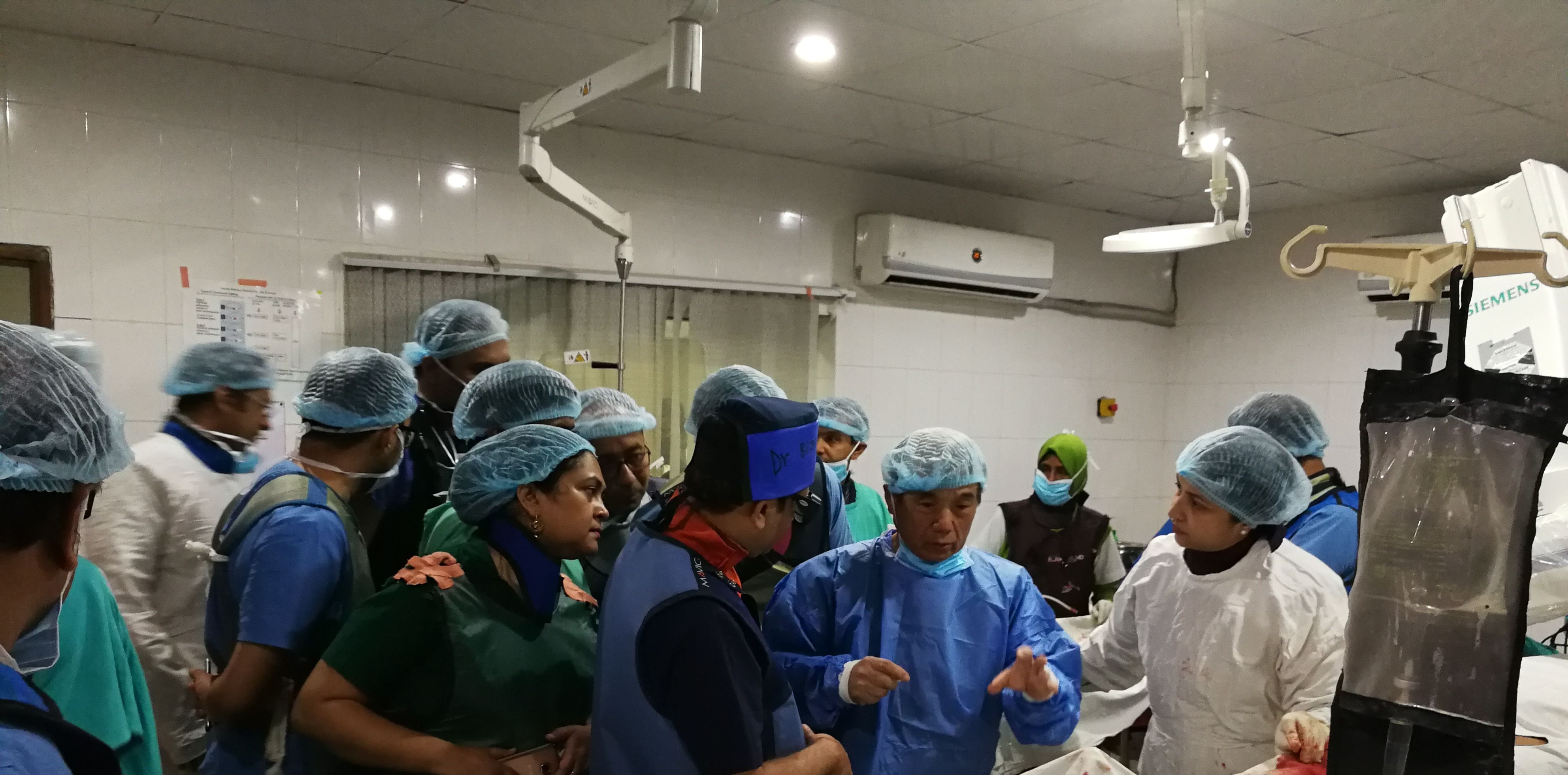 PTMC Training